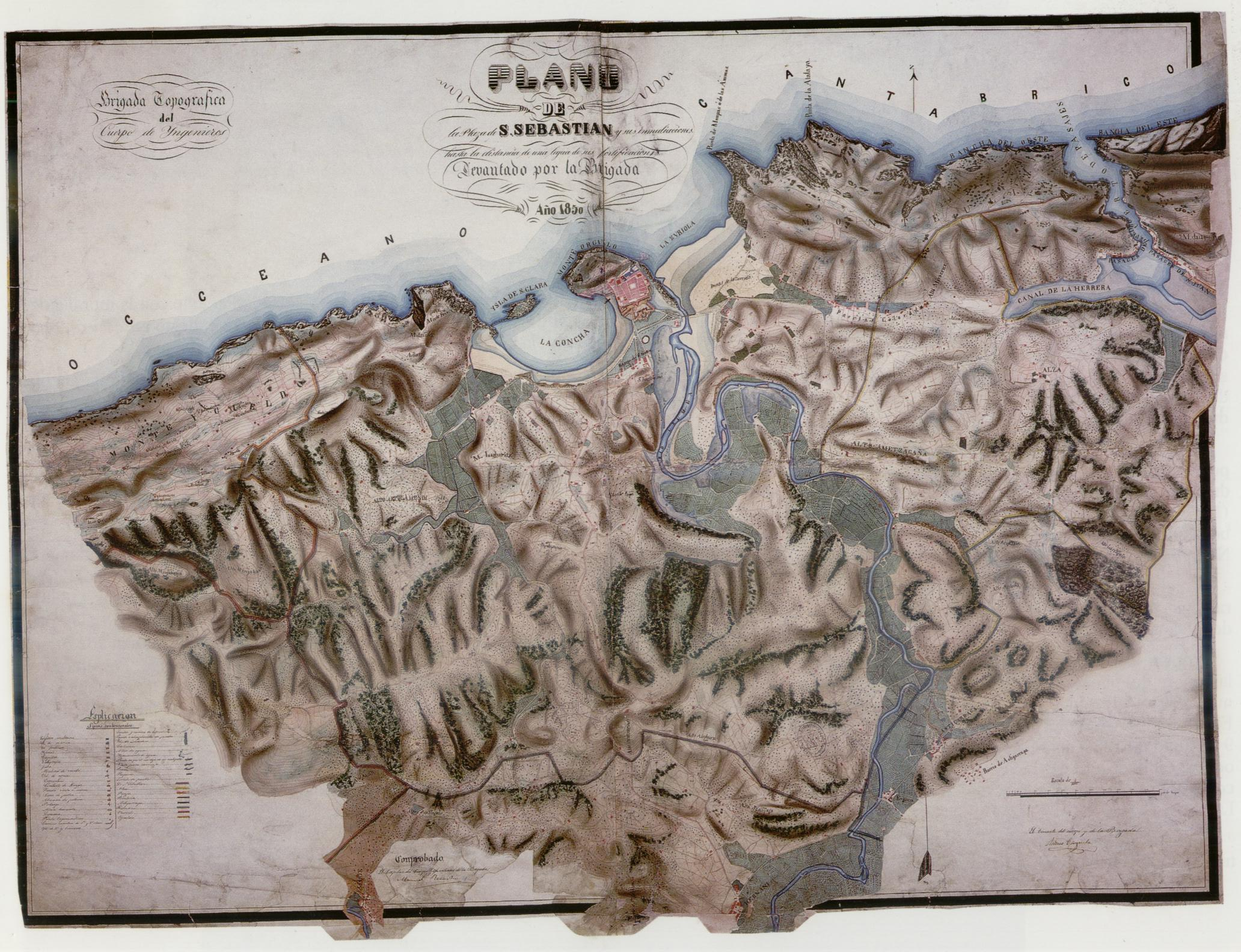 Donostia eta inguruak 1850ean.